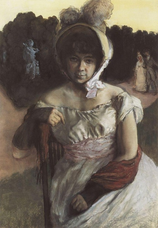 Портрет А.К.Бенуа. 1896